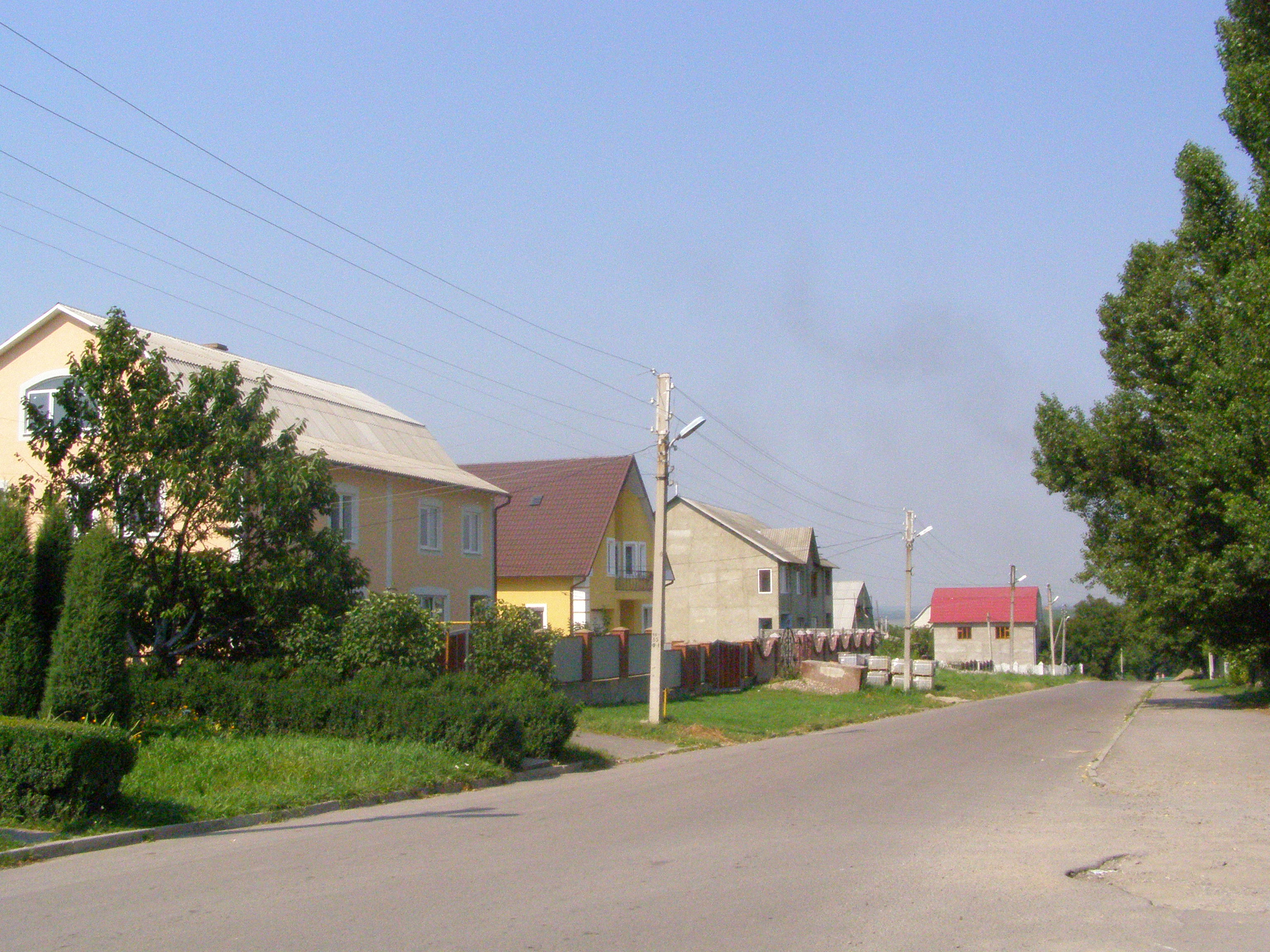 Chotyn, ulice